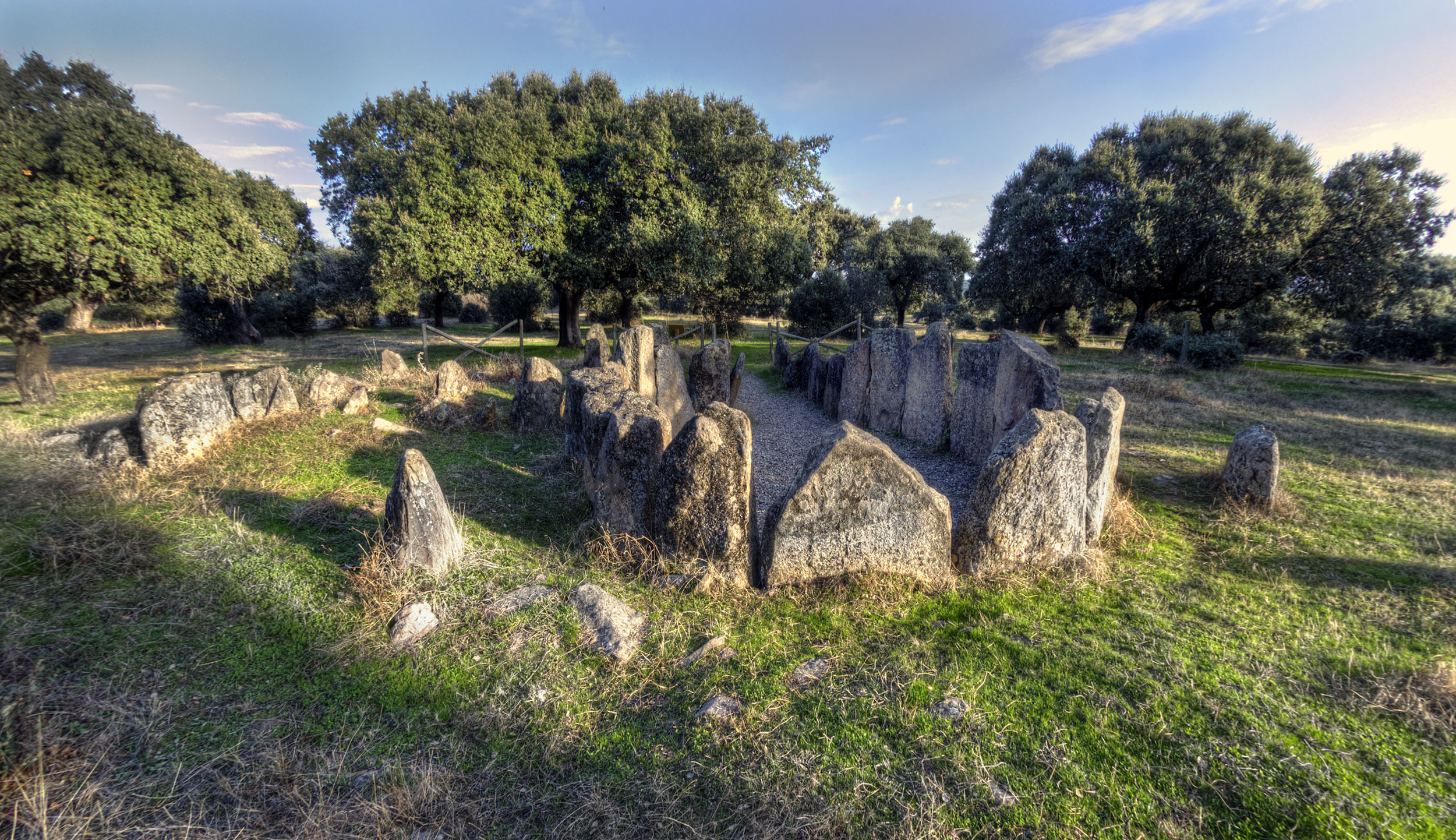 Dolmen de la Gran Encina, dehesa boyal de Montehermoso, provincia de Cáceres, España.